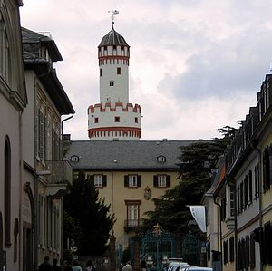 Der Weiße Turm in Bad Homburg vor der Höhe.